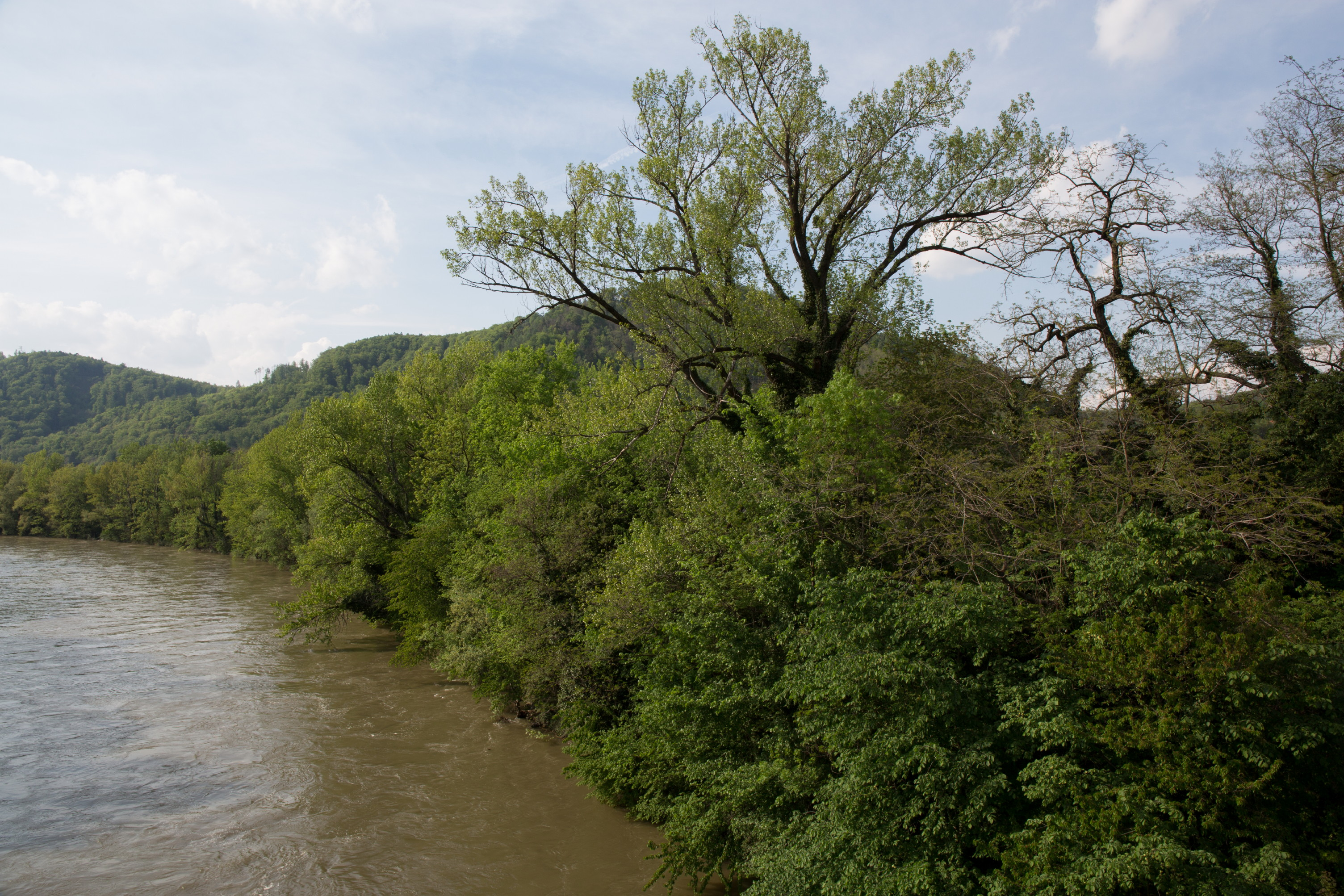 Vogelschutzgebiet Weinzödl This media shows the nature reserve in Styria with the ID NSG 108 c.